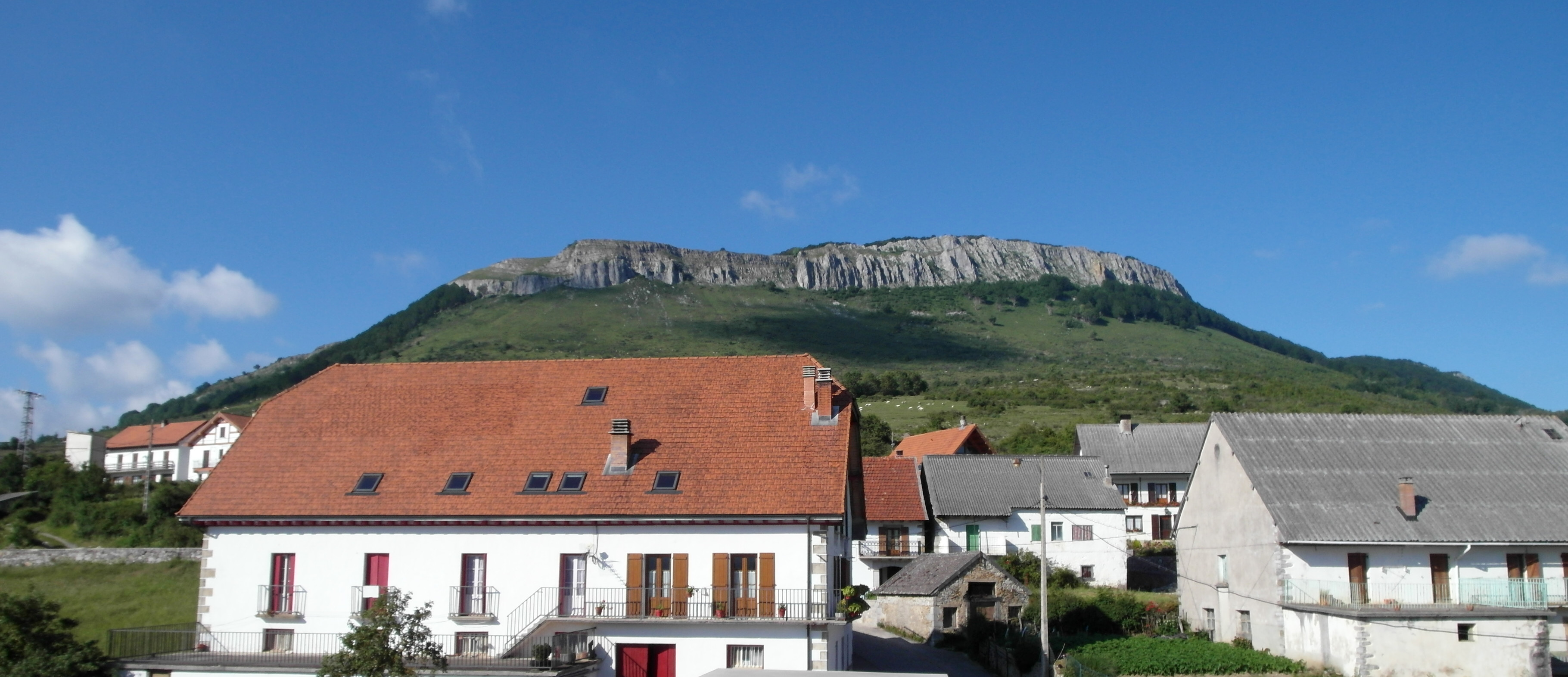 Berrendi desde Villanueva de Aézcoa.